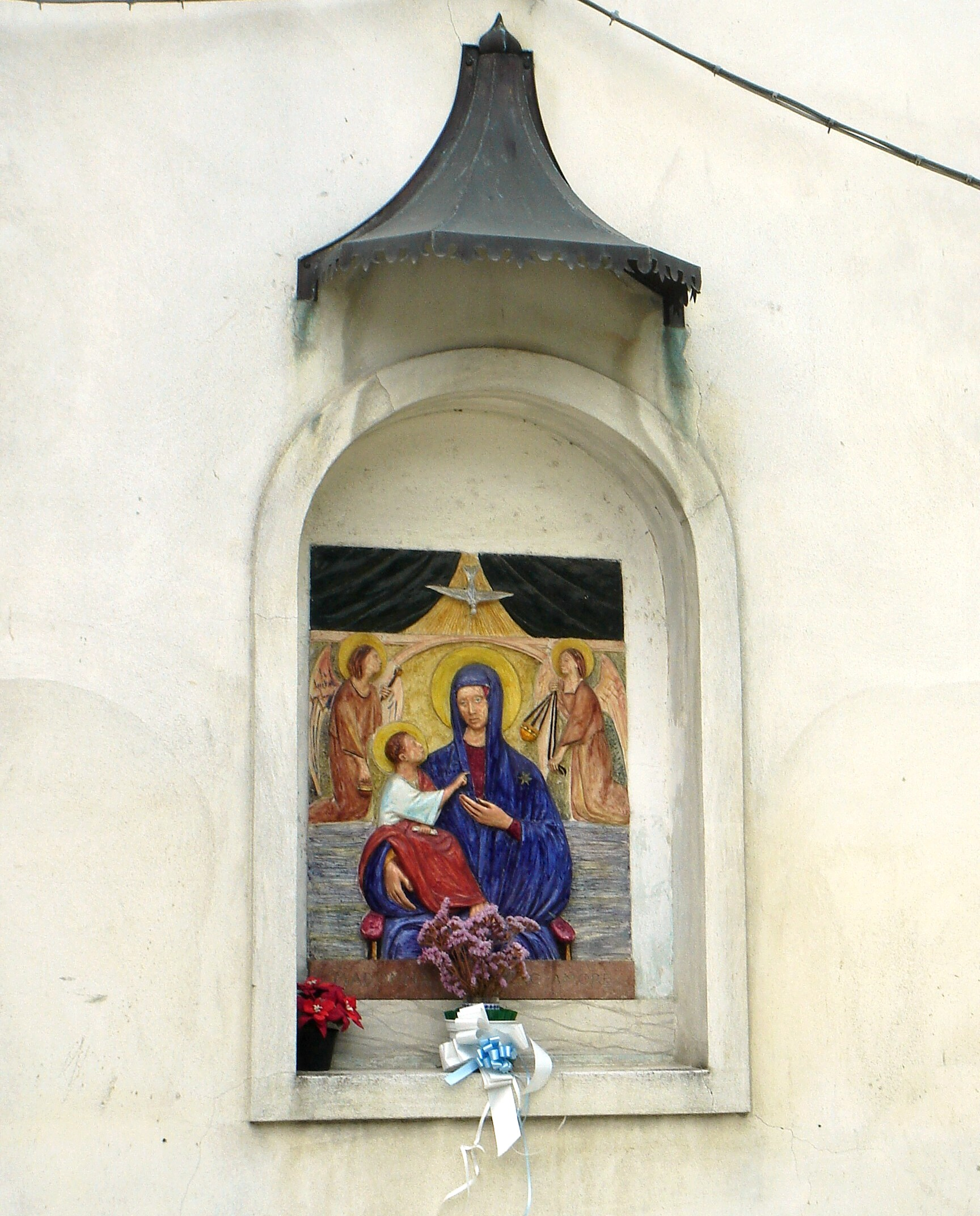 San Fior (Treviso, Italia): nicchia della Madonna del Divino Amore in largo G.B.Cima, davanti alla chiesa arcipretale.